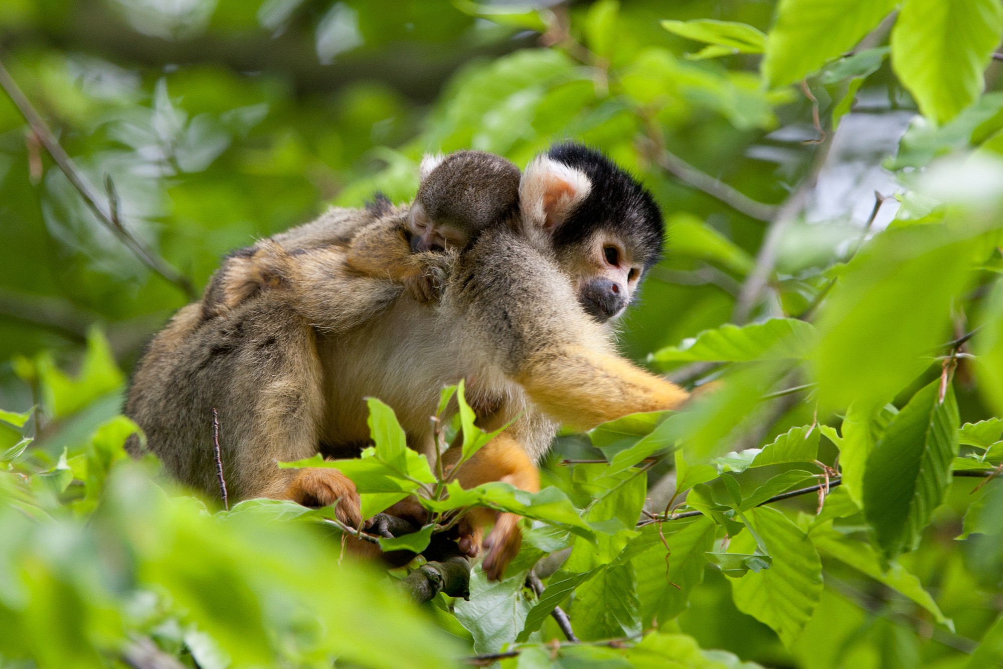 In Apenheul lopen de meeste apen los tussen de bezoekers.